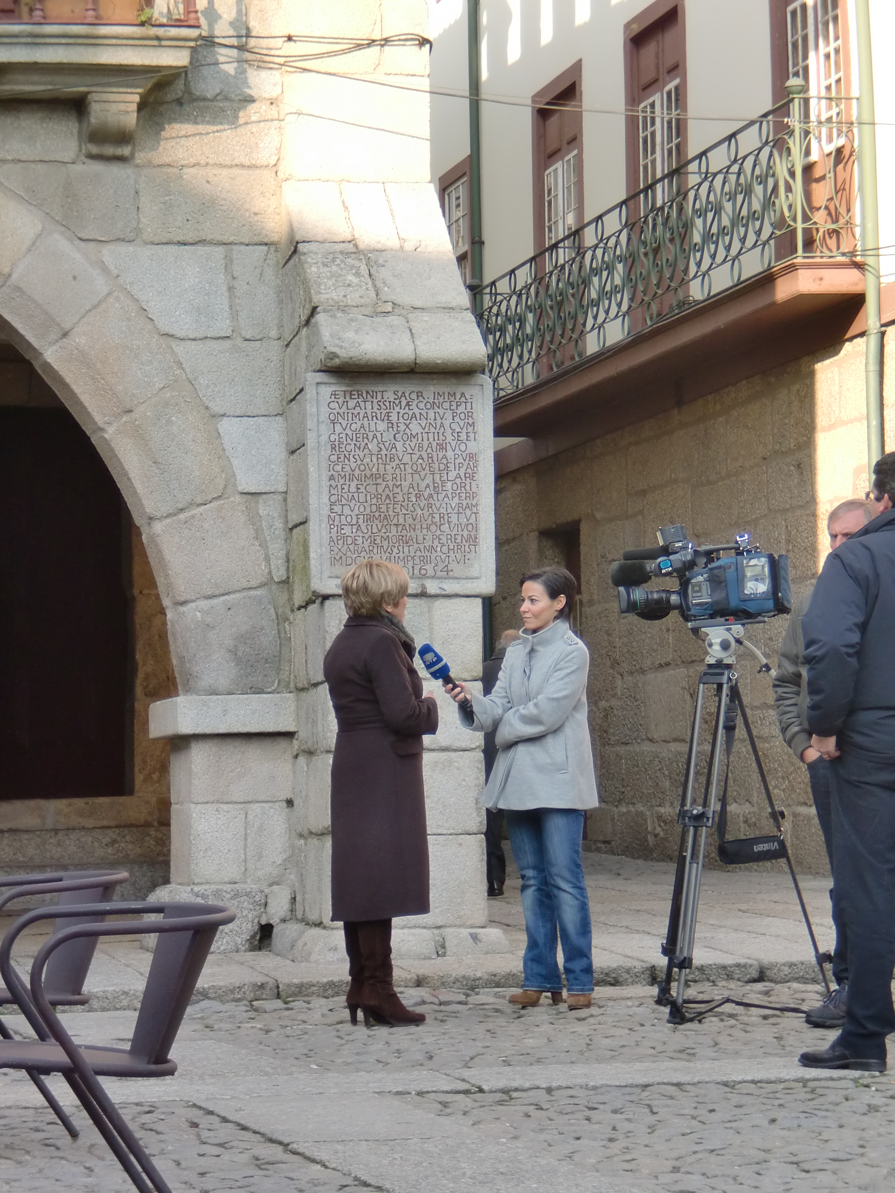 Jornalista da RTP (Joana França Martins) a entrevistar Francisca Abreu, Vereadora da Cultura da Câmara Municipal de Guimarães, no Largo da Oliveira (Centro Histórico de Guimarães).